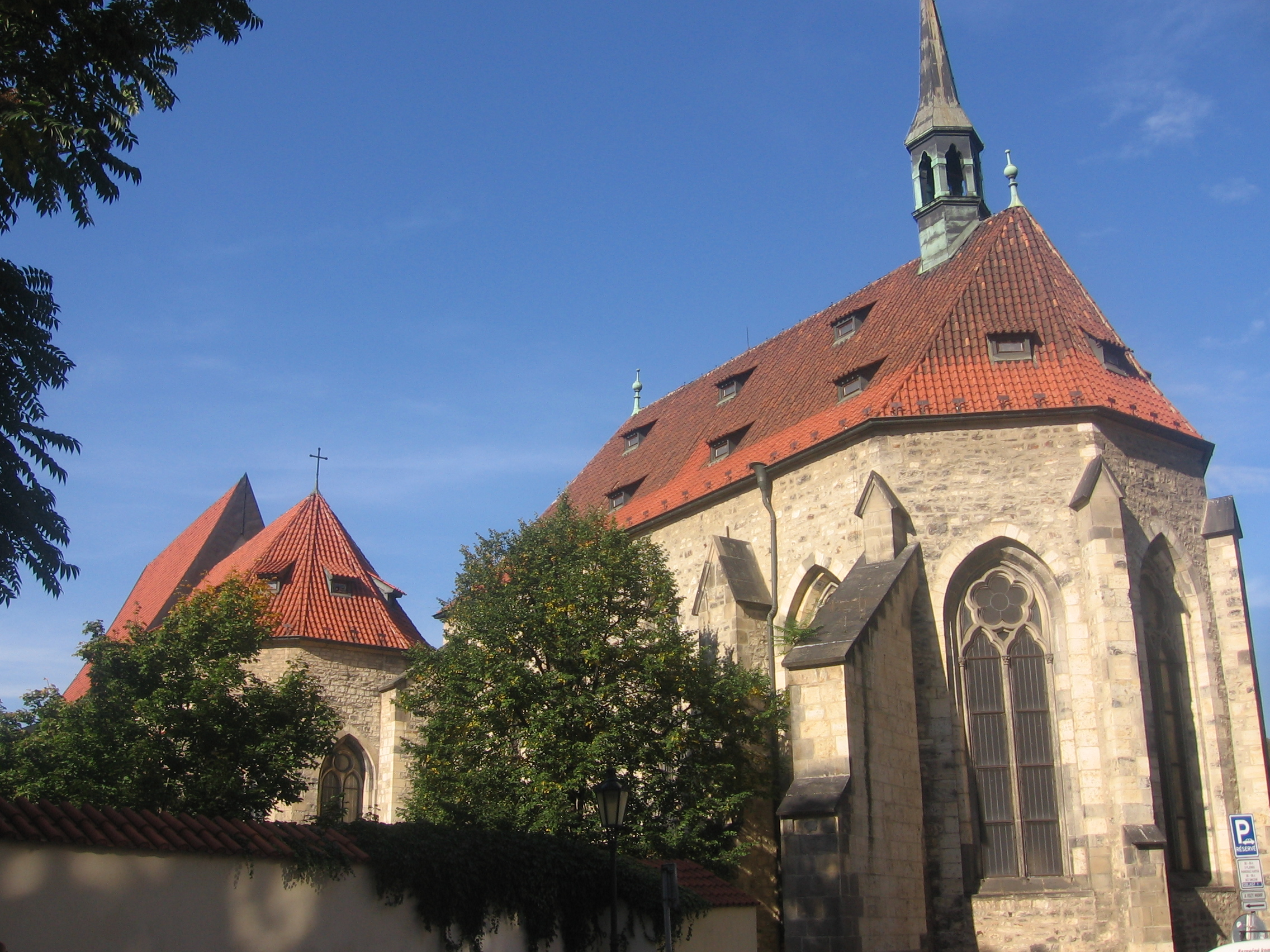 Sankt Agnes-Kloster, Prag